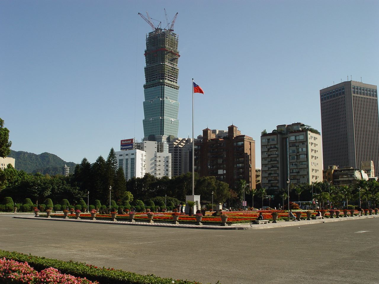 2003年春，從台北市國父紀念館遠望興建中的台北101。此照片由阿仁（seasurfer）拍攝。